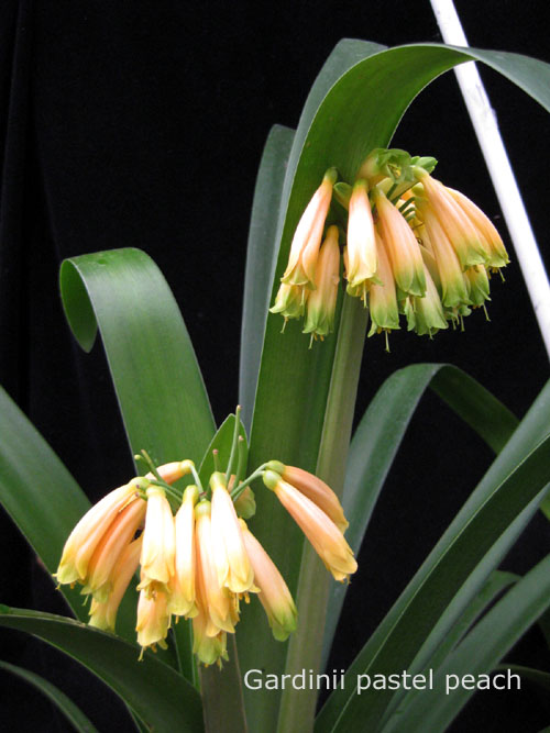 Clivia gardinii 'Pastel Peach'